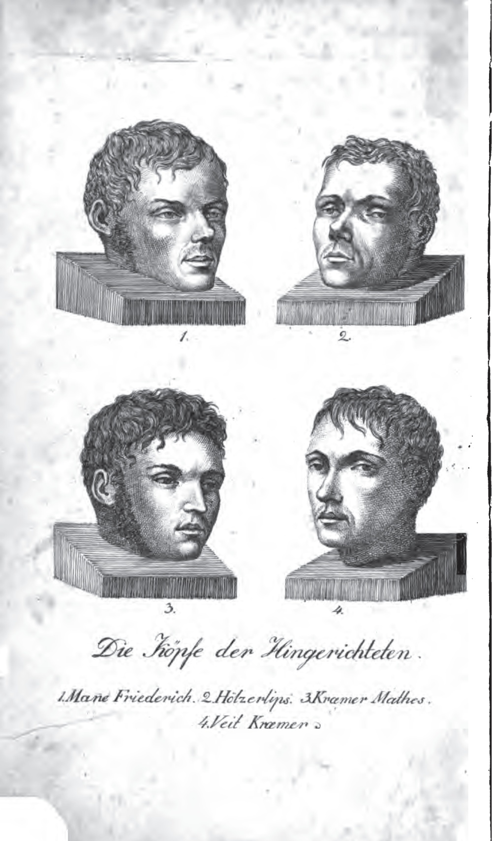 Die Köpfe der Hingerichteten: Mannefriedrich (1), Hölzerlips(2), Krämer Mathes(3), Veit Krämder(4), nach ihrer Hinrichtung im Jahr 1812, wegen dem Raubmord an einem Schweizer Kaufmann.